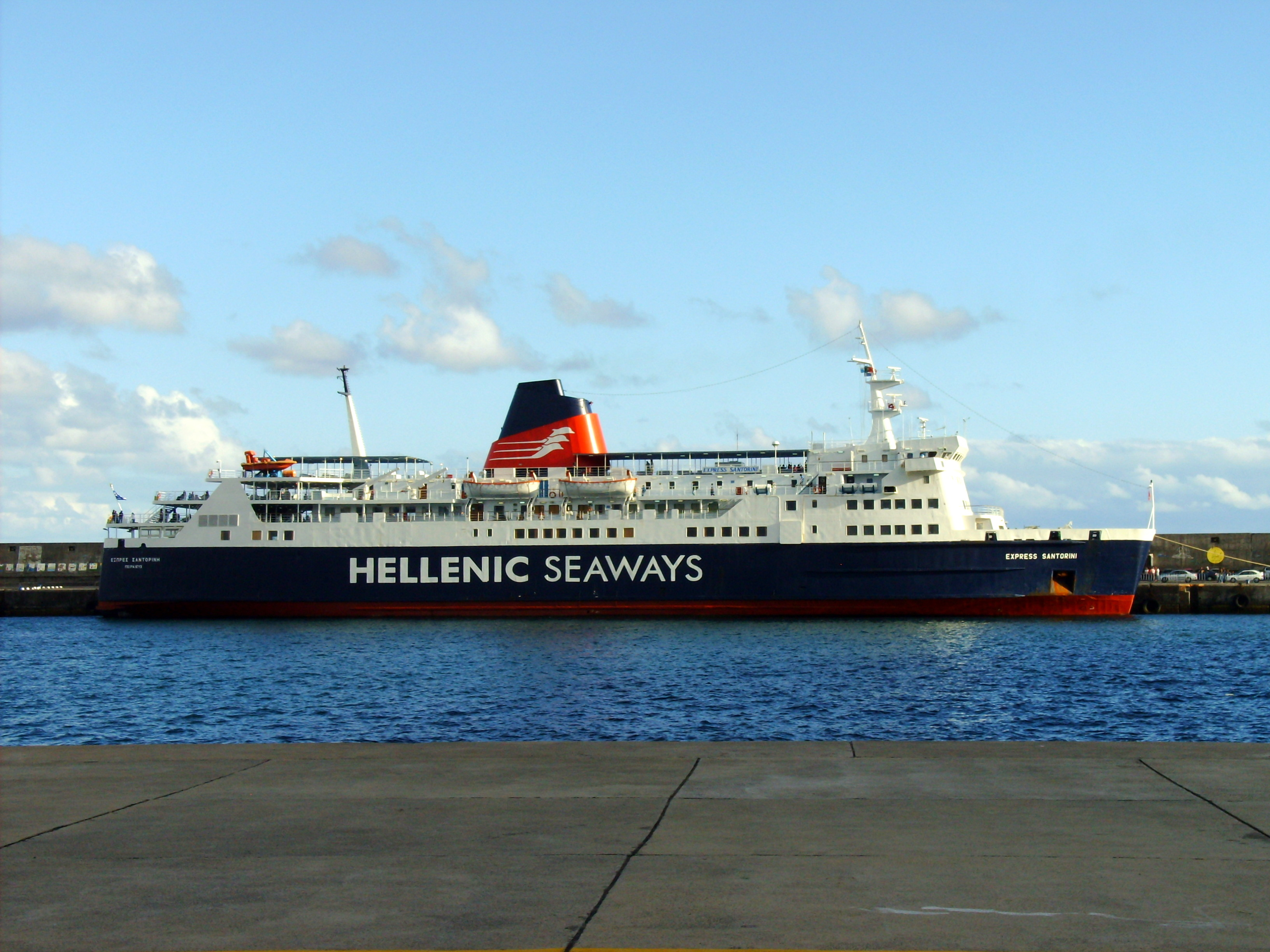 M/F Express Santorini no porto de Vila do Porto, ilha de Santa Maria, Açores. IMO Number: 7330040 MMSI Number: 240636000 Callsign: SXQR Length: 115,4 m Beam: 19,2 m